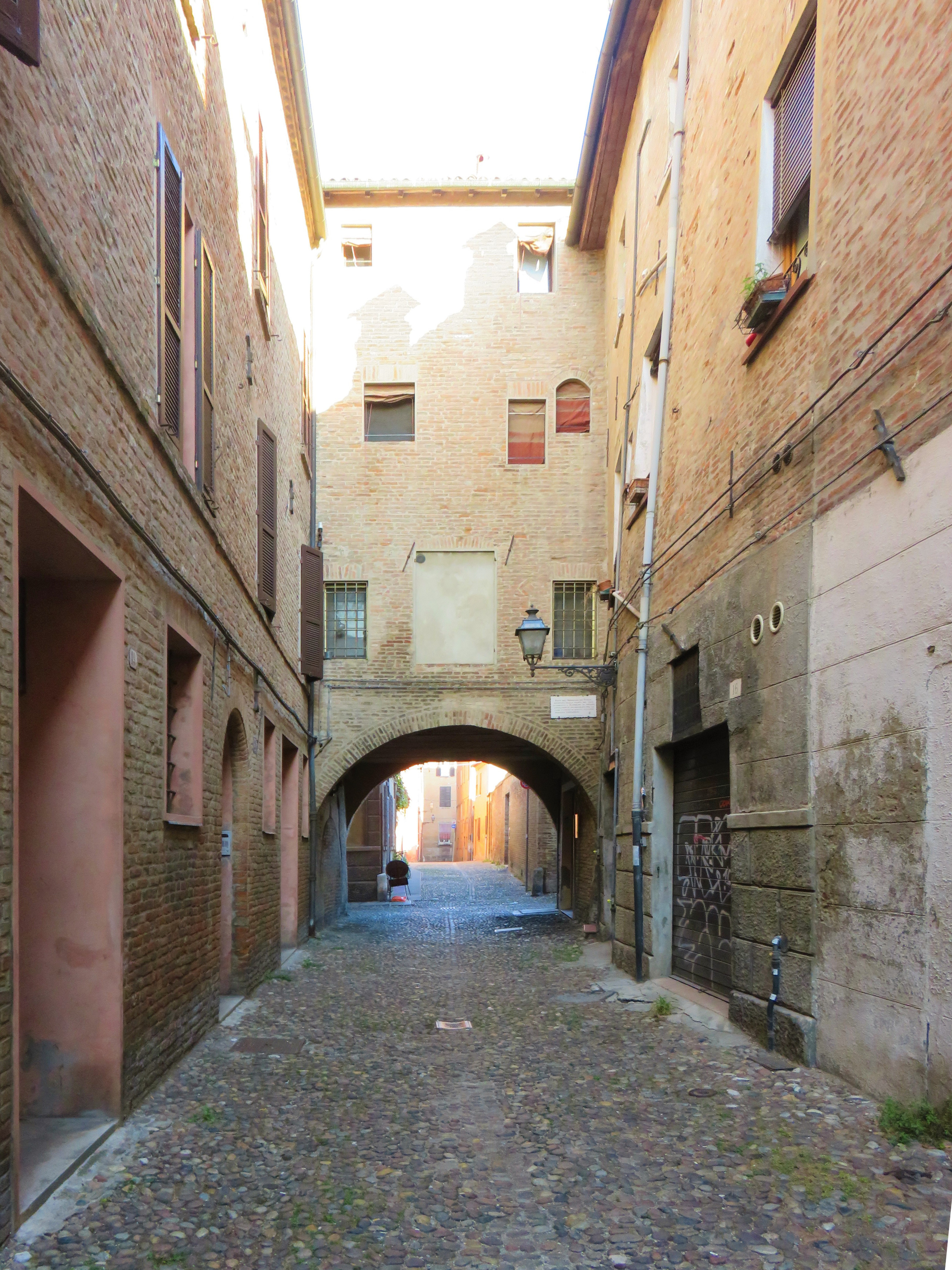 Volto su via Capo delle Volte (ancolo via del Turco) e resti dell'antica dimora della famiglia Turco o Del Turco, di Ferrara. XIV secolo. Attribuito a Bartolino da Novara, architetto del Castello Estense.